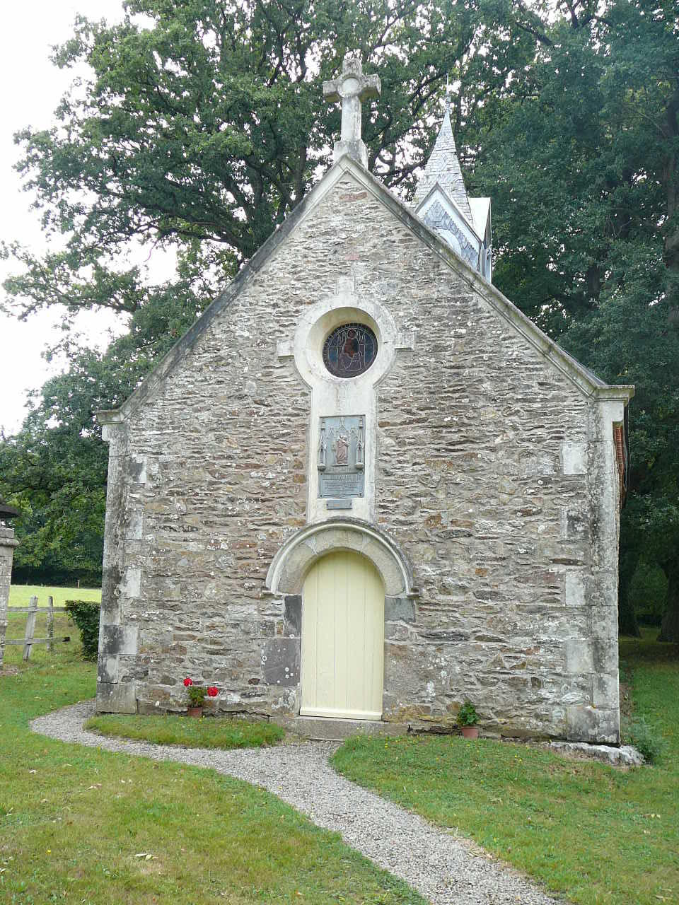 Chapelle - La Touche Saint-Joseph